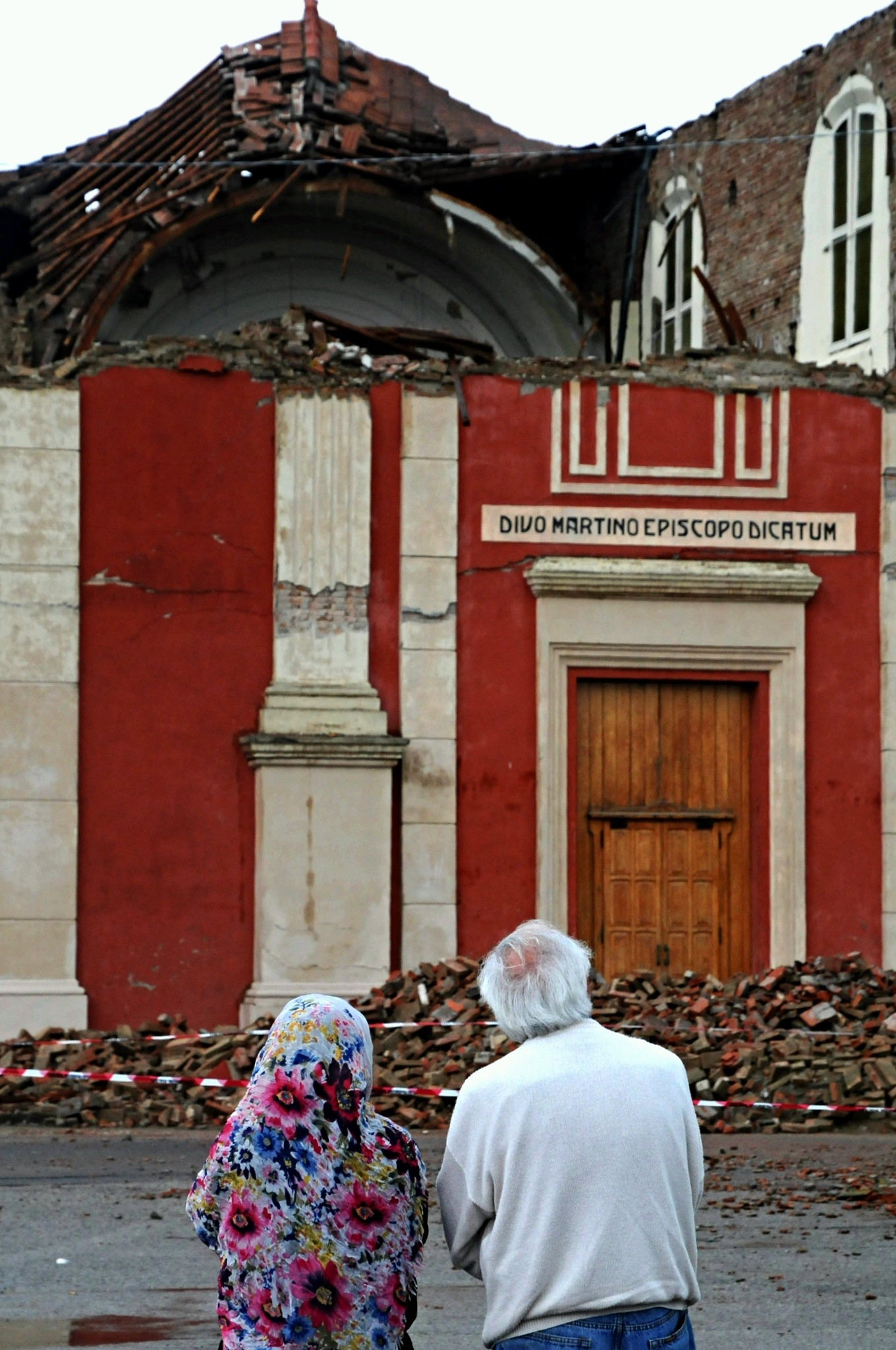 Buonacompra, Casumaro (Ferrara), terremoto 20 maggio 2012